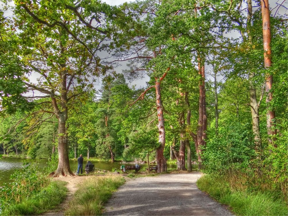 Pfaffensee bei Stuttgart. Bild in HDR